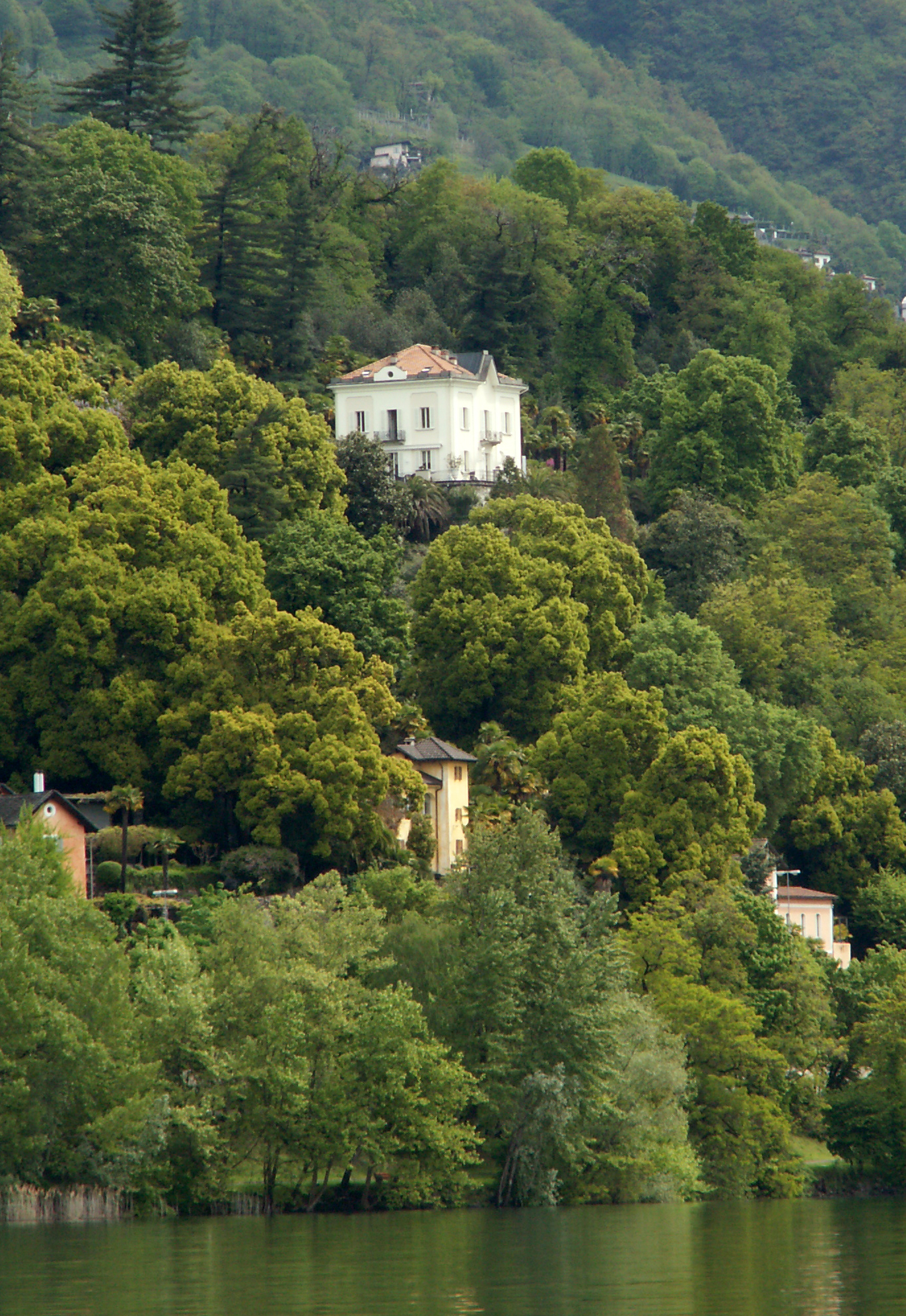 La Baronata, villa acquise par Carlo Cafiero au printemps 1873. Bakounine y séjourna.